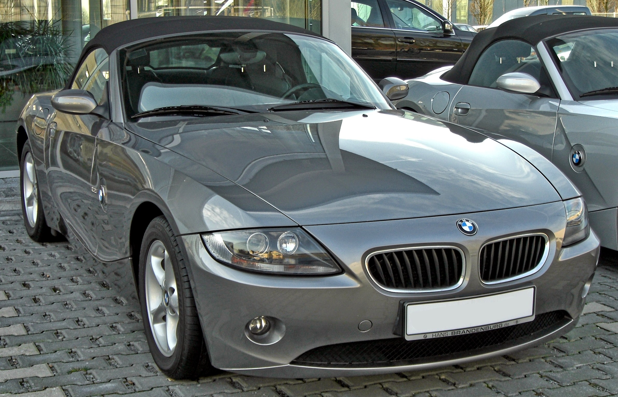 BMW Z4